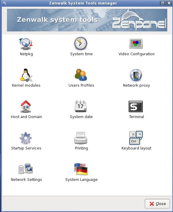 ZenPanel